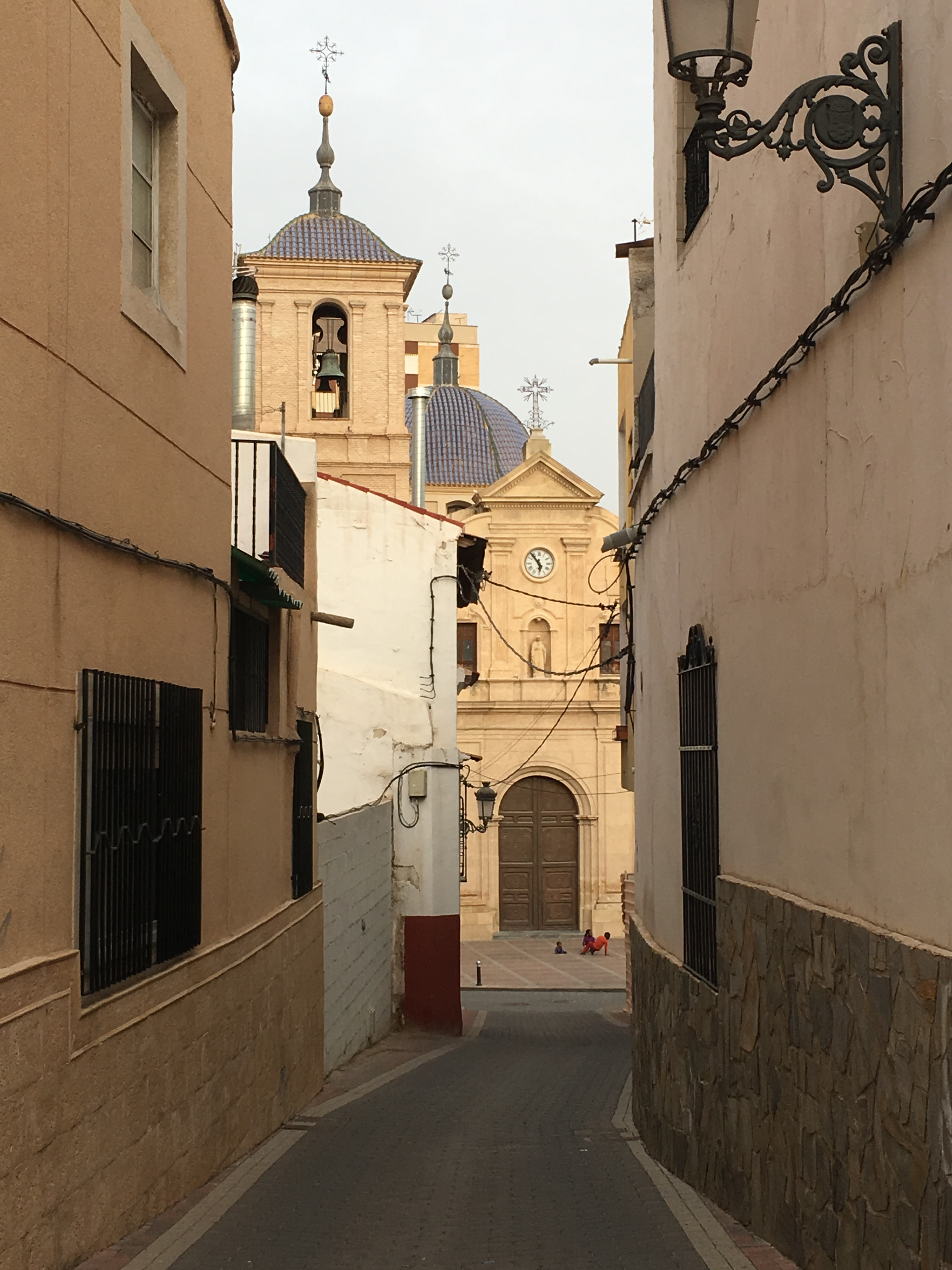 Iglesia de Nuestra Señora de la Asunción. Molina de Segura.